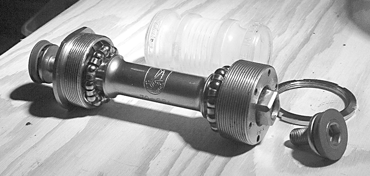 Autor: Ralf Roletschek gfdl